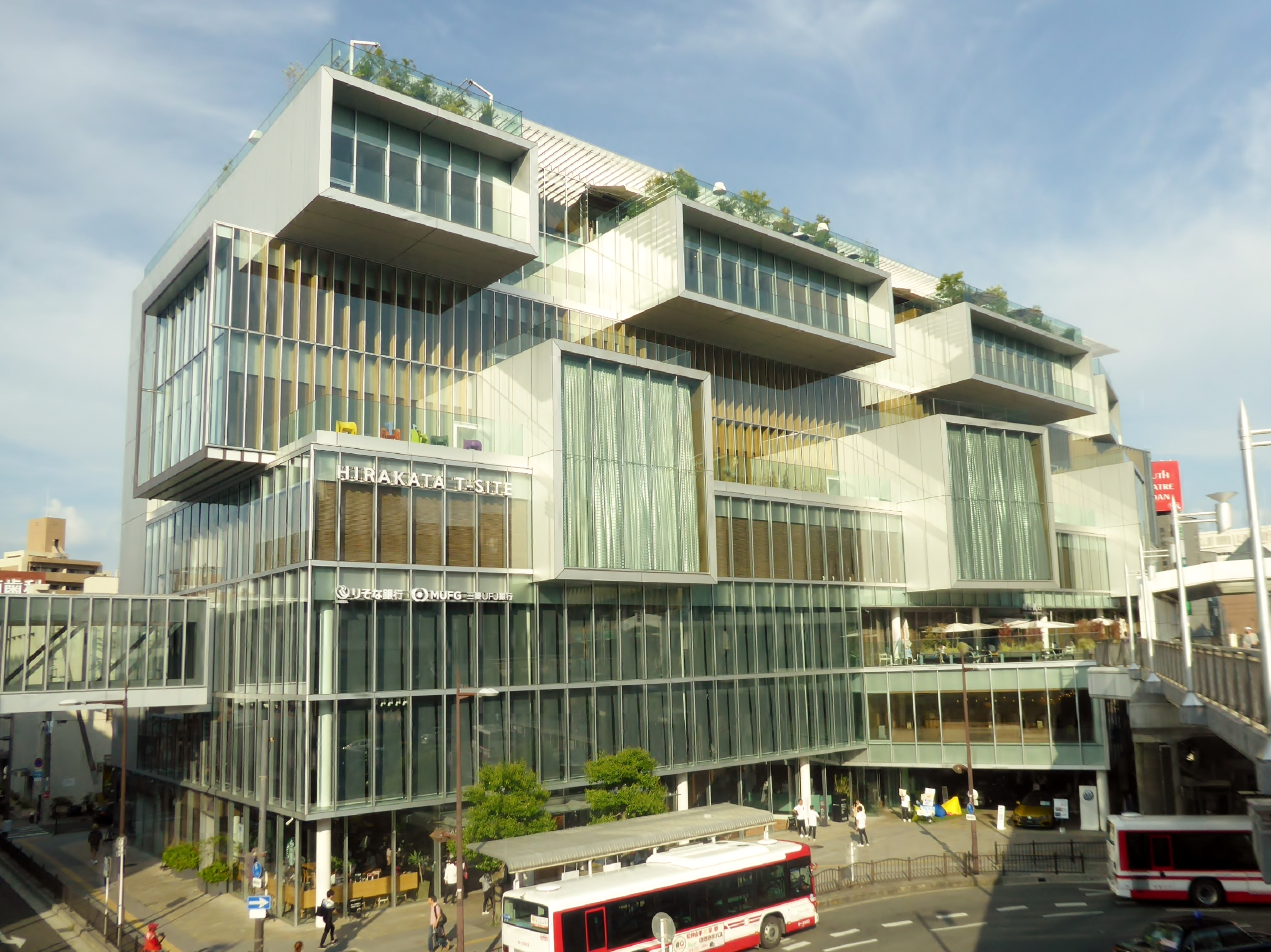 枚方T-SITEを撮影。